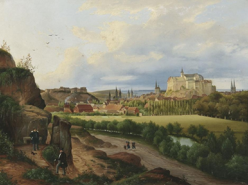 Quedlinburg. Öl auf Leinwand. 49 x 66,5cm.